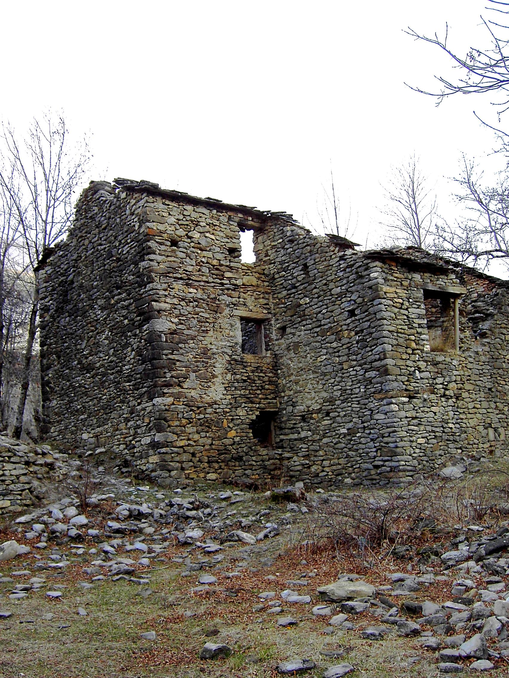 Casas derruidas en Escuaín.